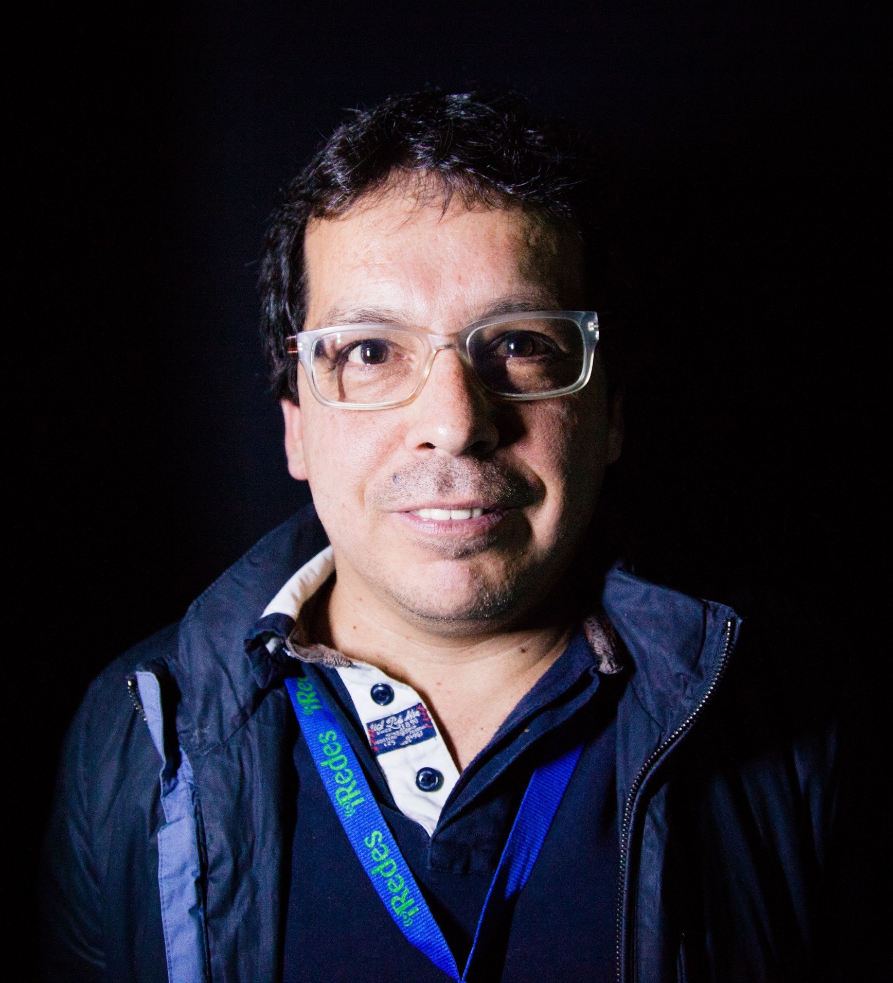 fotos por Victoriano Izquierdo ( @victorianoi )